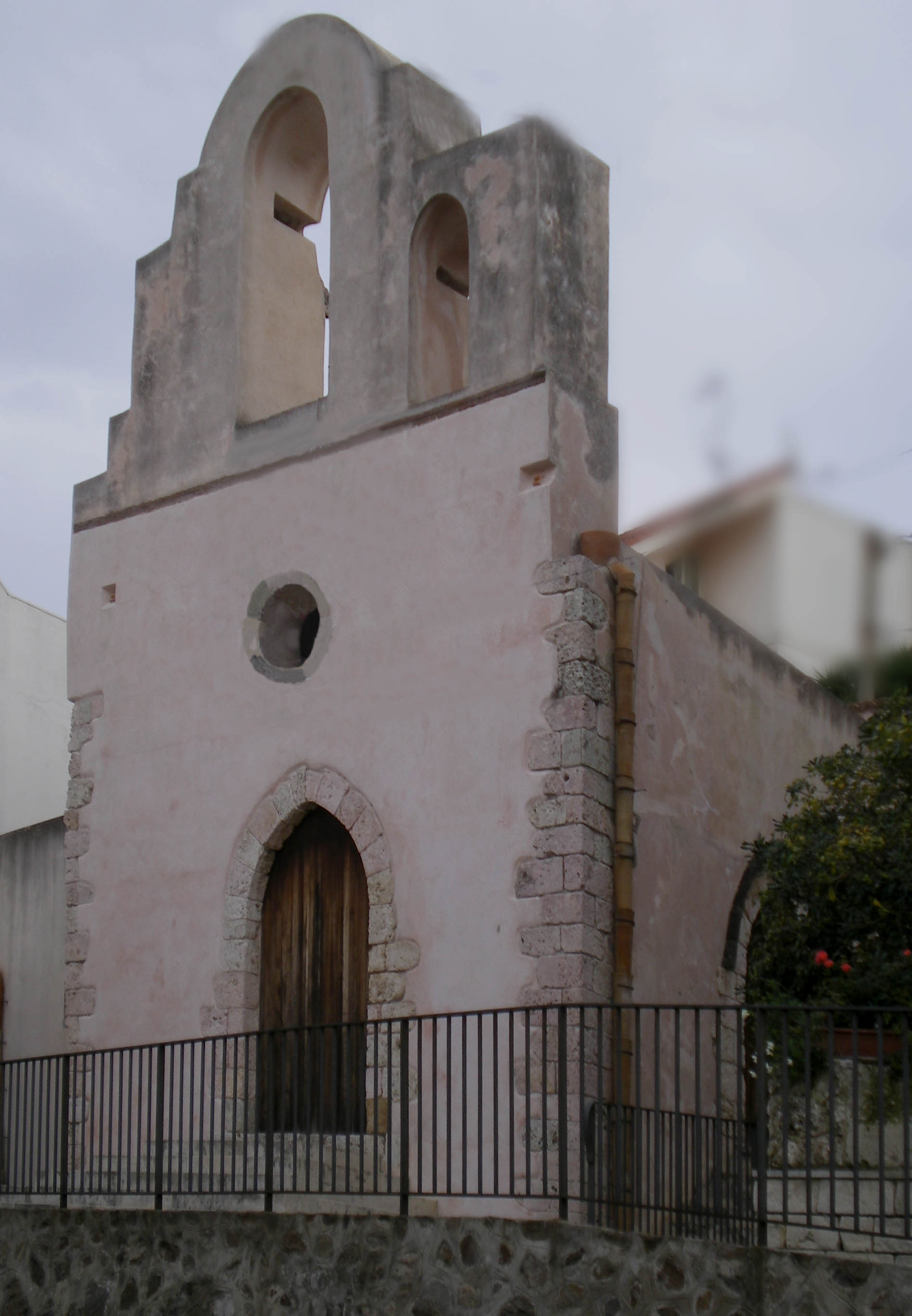 Facciate della Chiesa di Santo Stefano Juniore di Salice